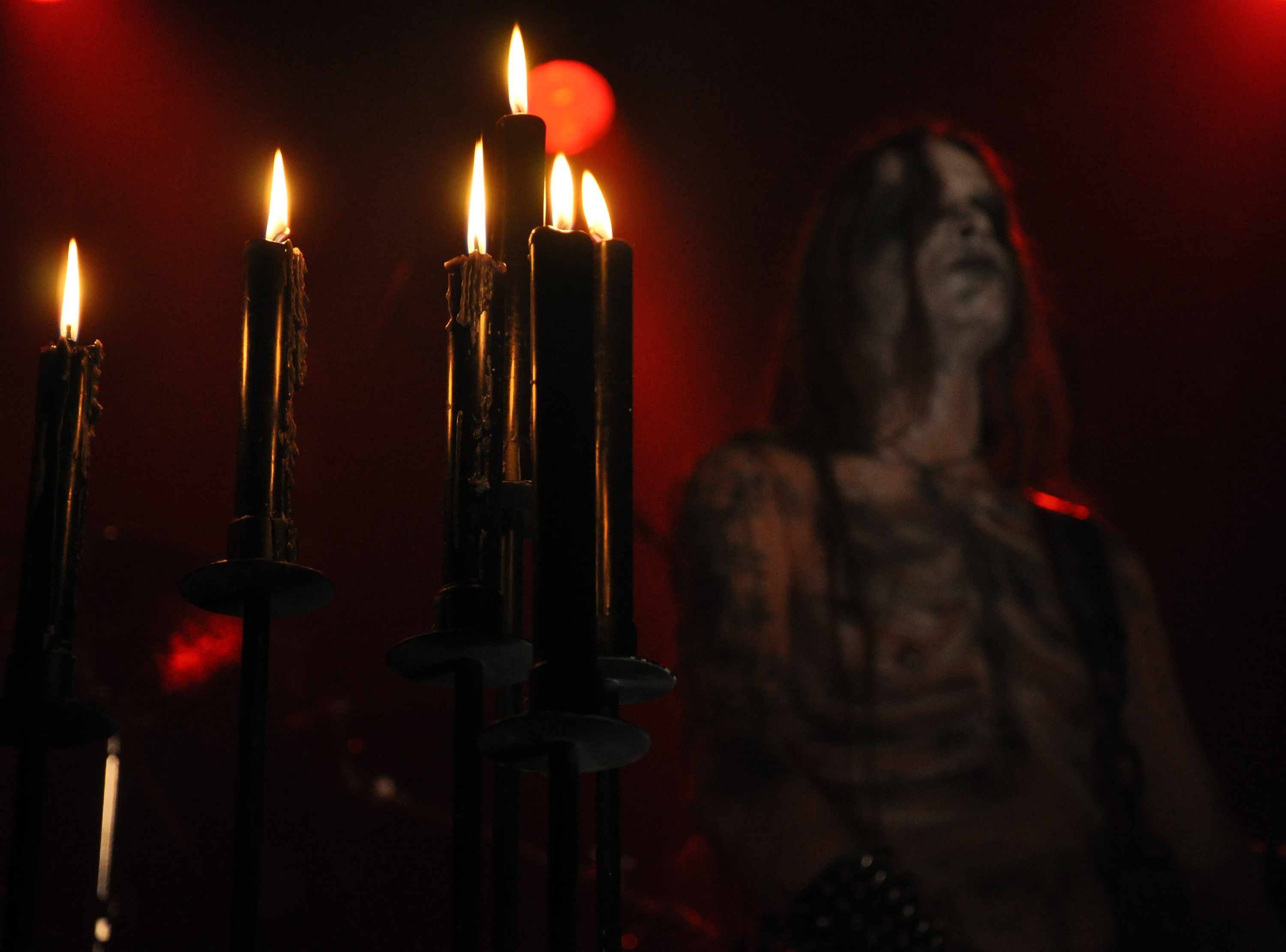 Chandelles noires utilisées comme décor de scène dans un concert de Black Metal.